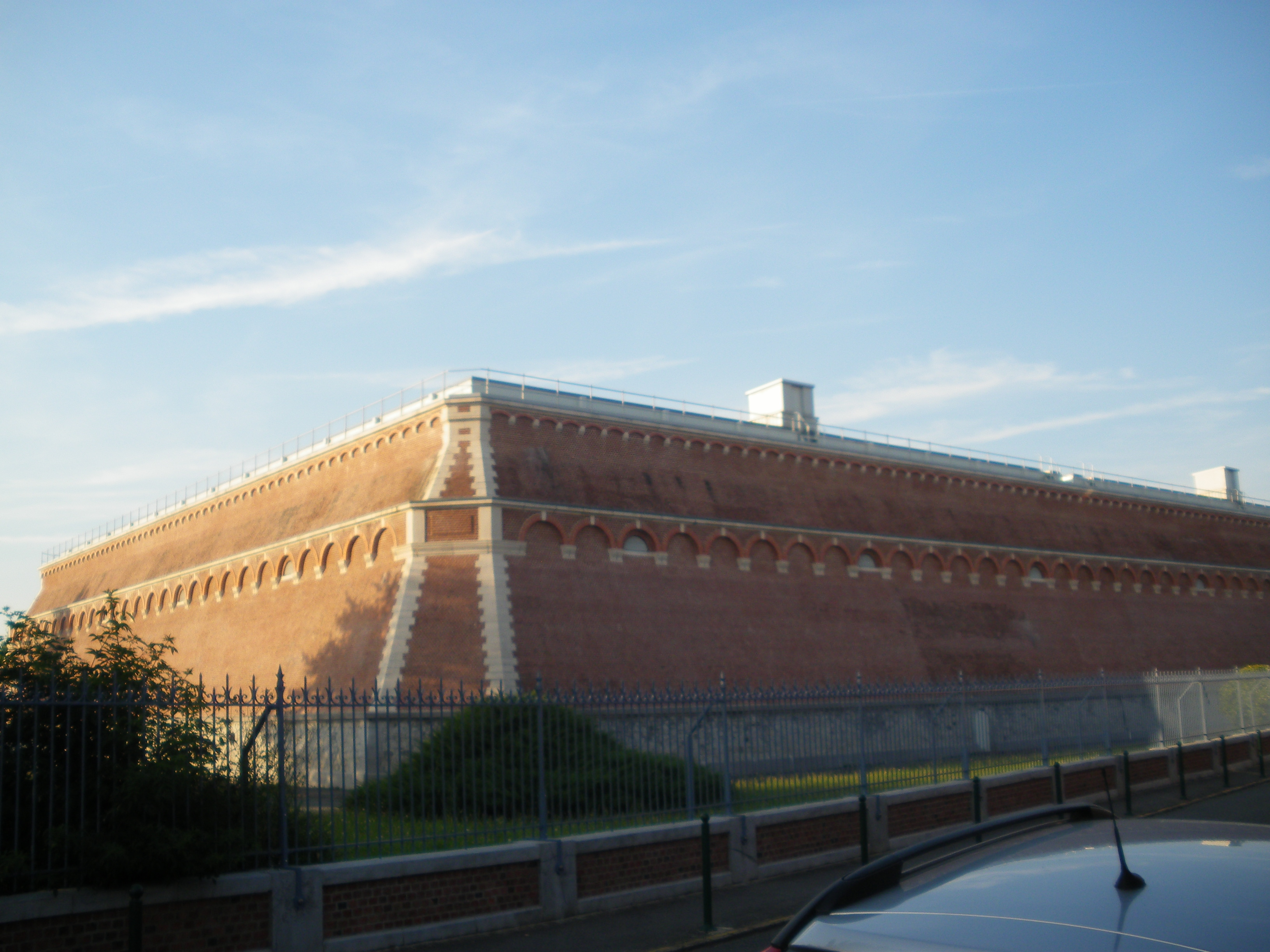 Vue du château d'eau de Mouvaux dans le département du Nord.